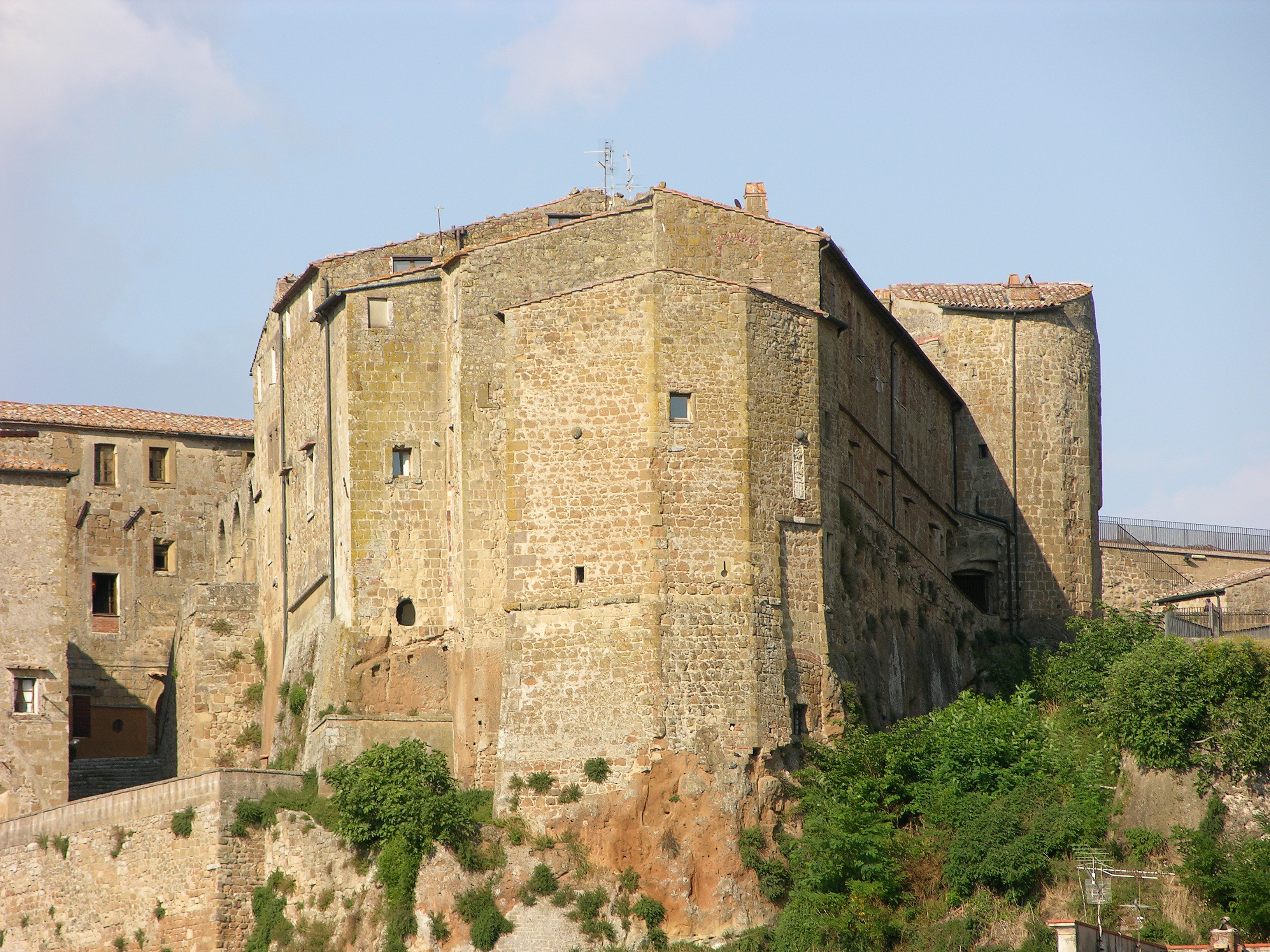 Vista della Fortezza Orsini di Sorano (GR)